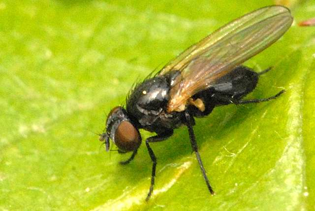 Fannia sociella from Commanster, Belgian High Ardennes .